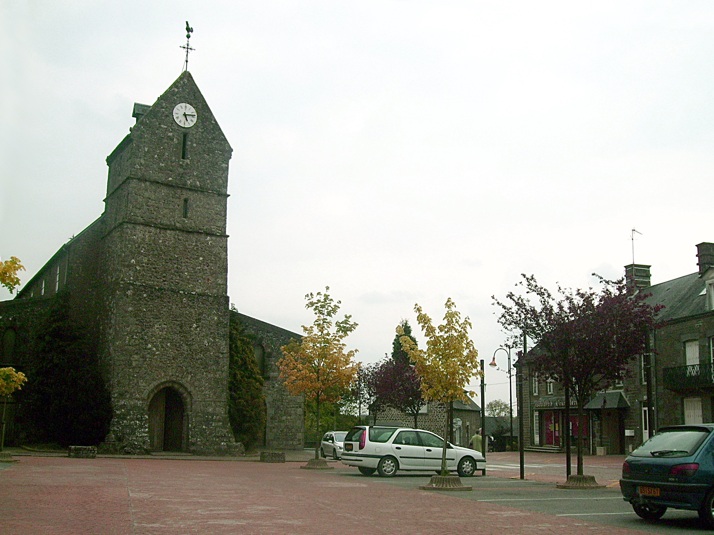 Eglise de la sauvagère